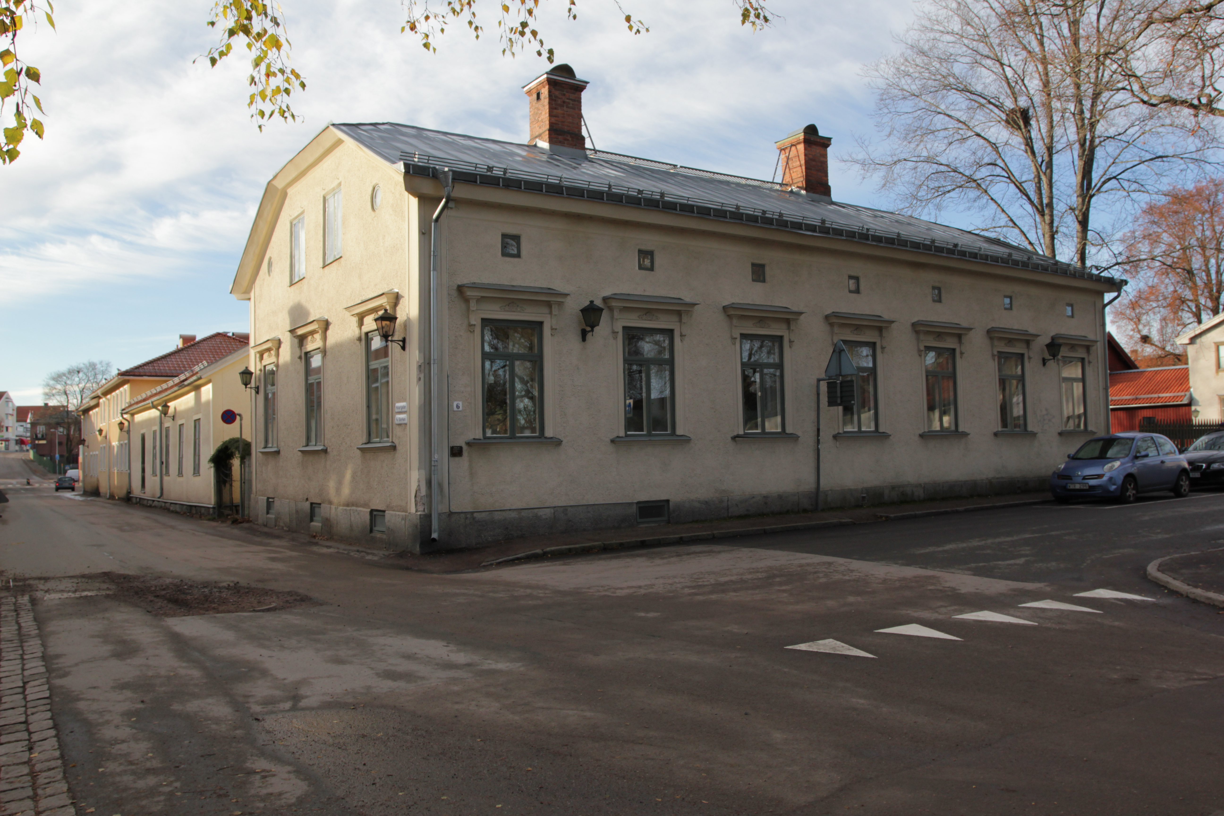 Berglundska gården, Hedemora, Sverige